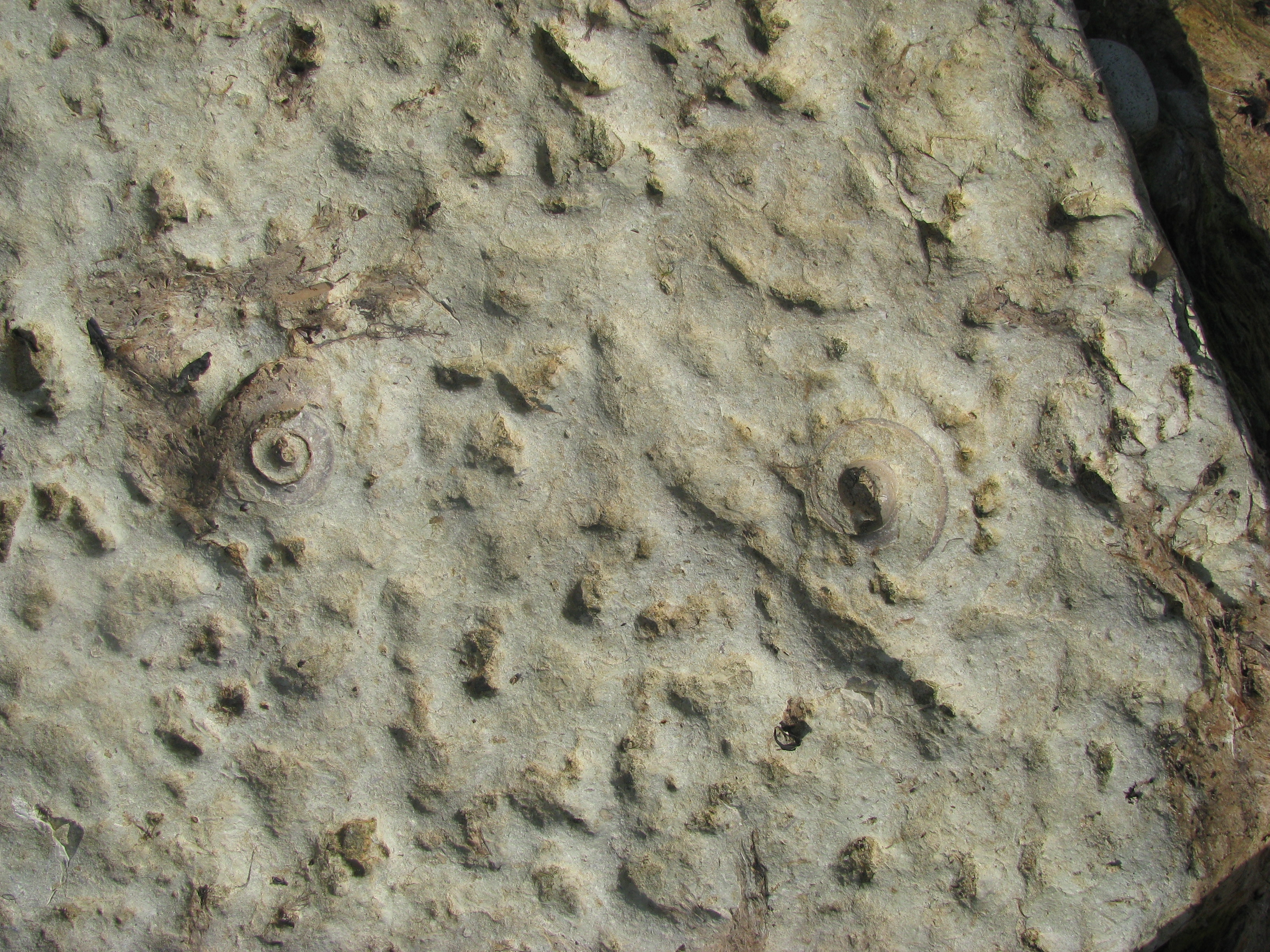 Fossiilid Türisalu pangast murdunud paelahmakas